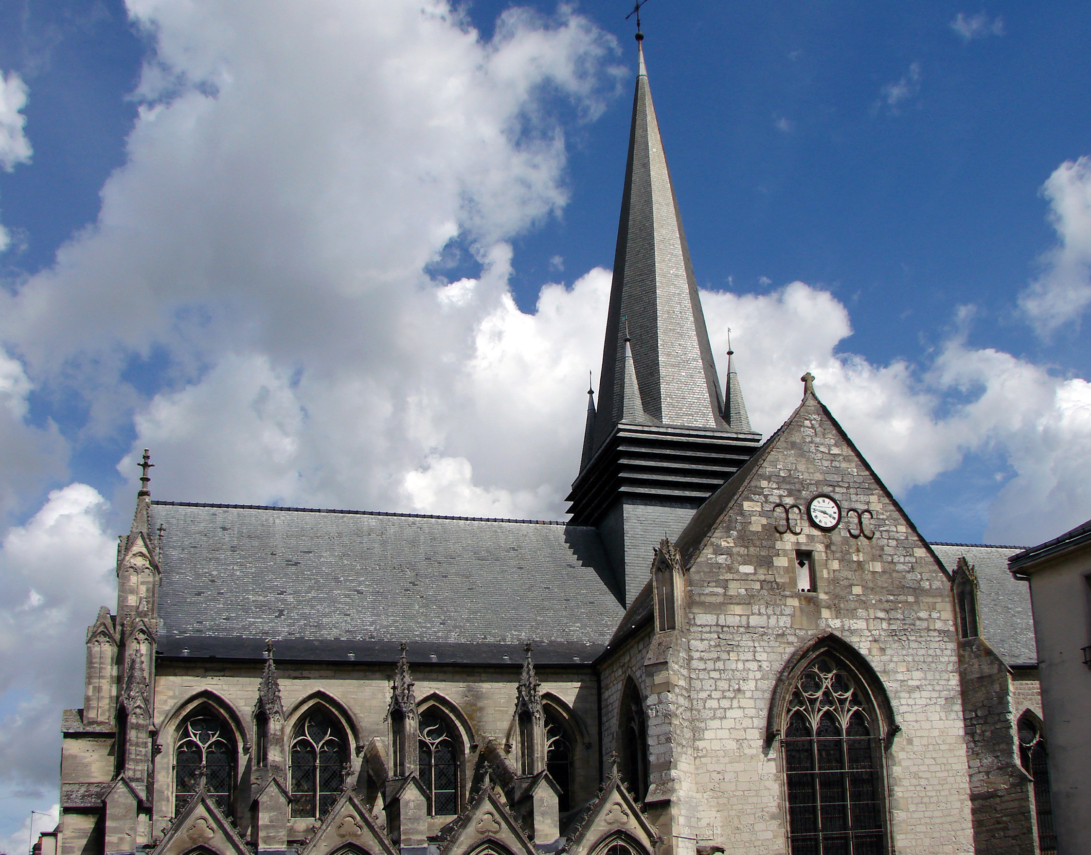 Basilique Notre-Dame de Liesse